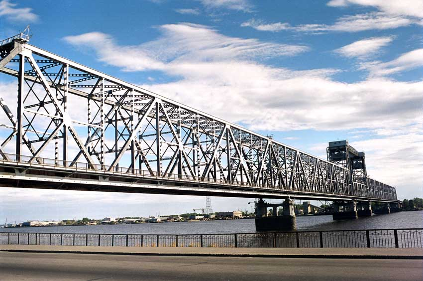 Мост через Двину